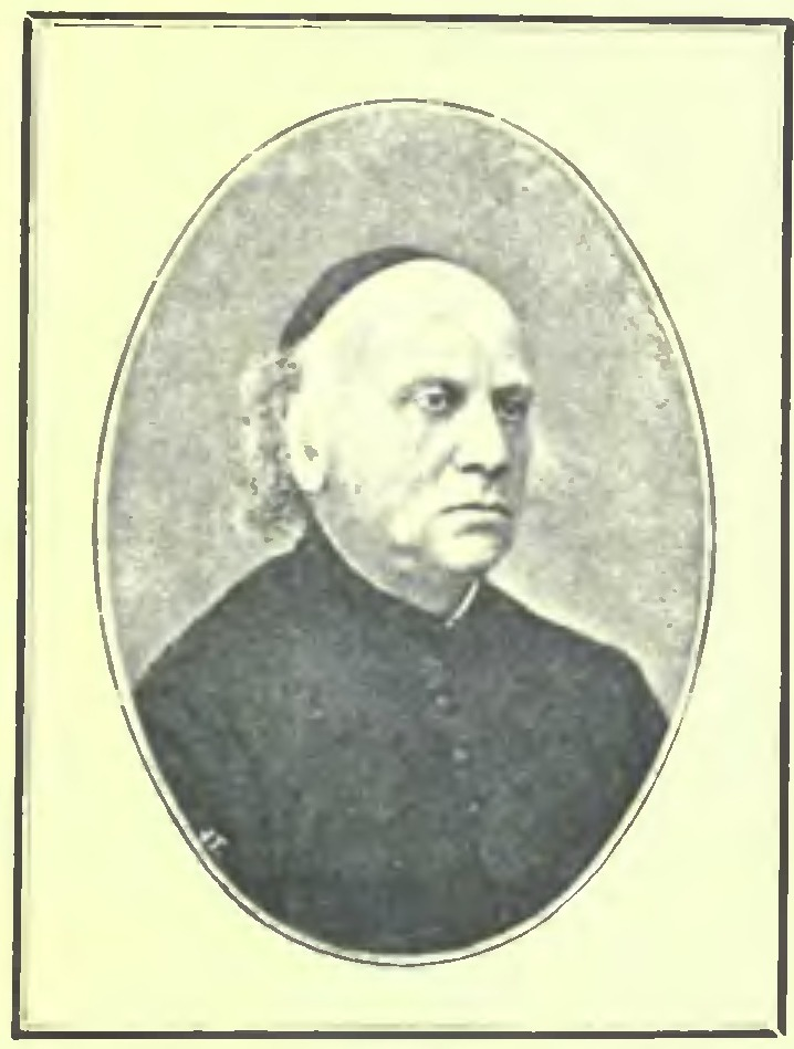 "Rivista italiana di numismatica", a numismatic magazin of "Società Numismatica Italiana"